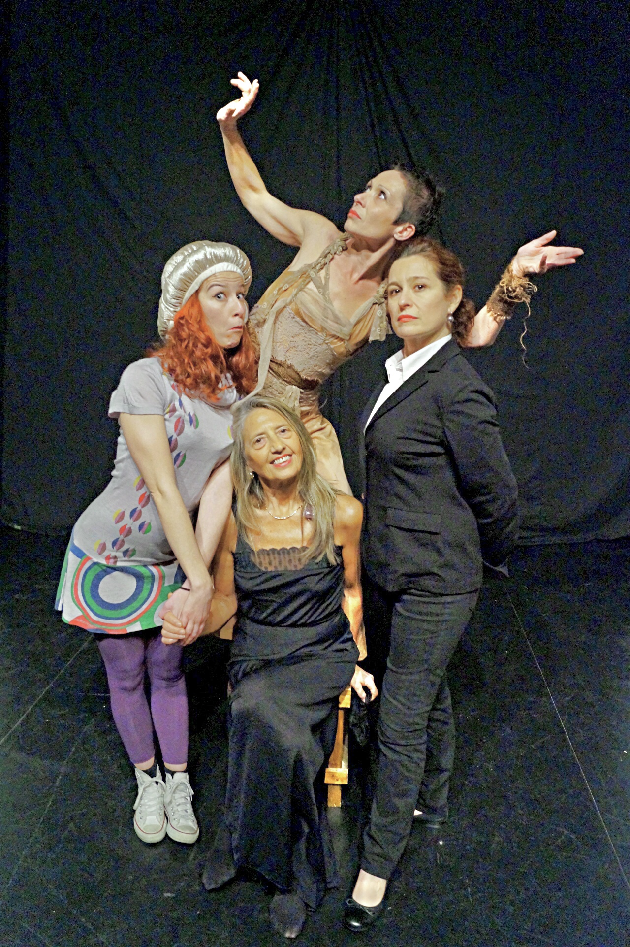 Foto delle attrici de "Il rito sull'albero del Fico", spettacolo del 2016